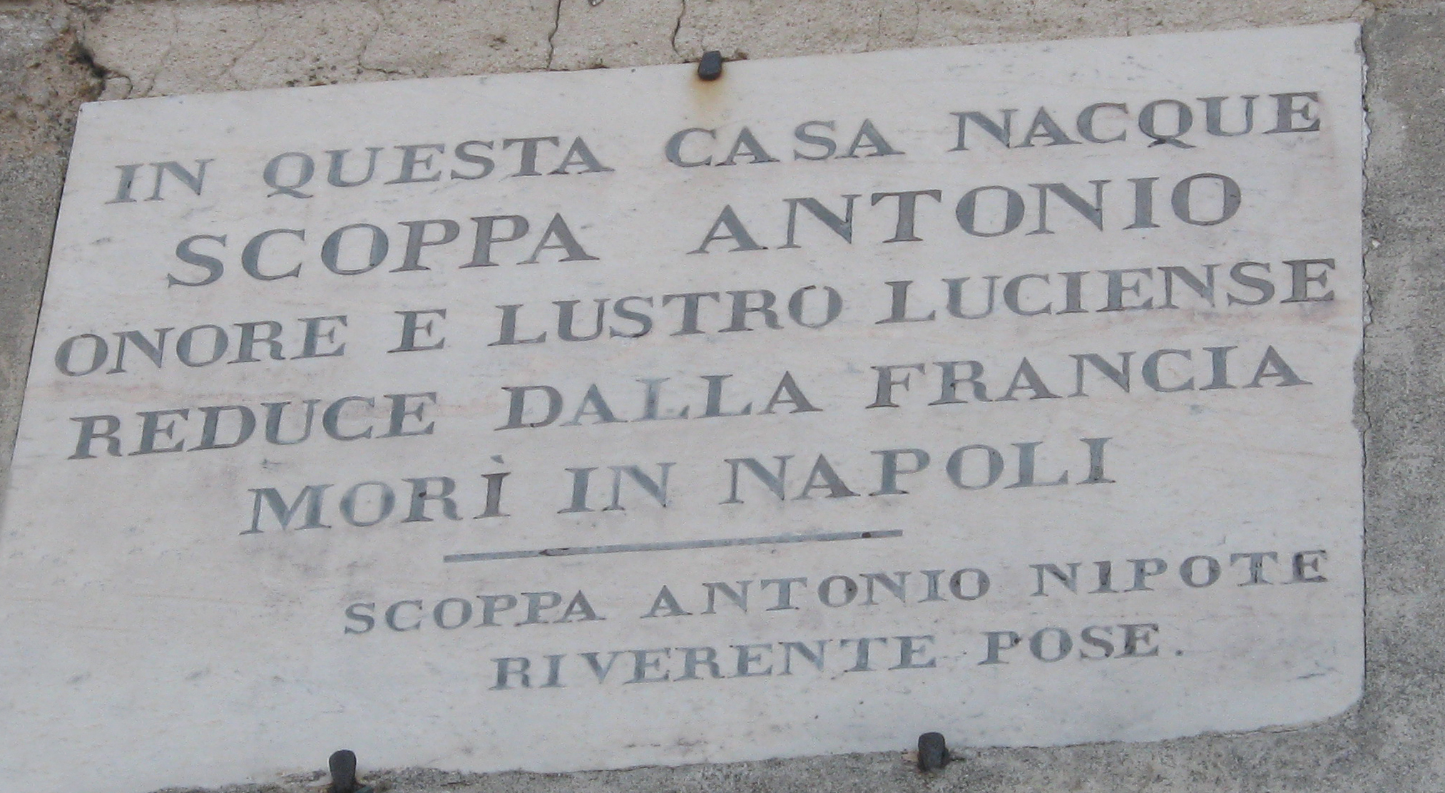 Insegna casa in cui nacque Antonio Scoppa